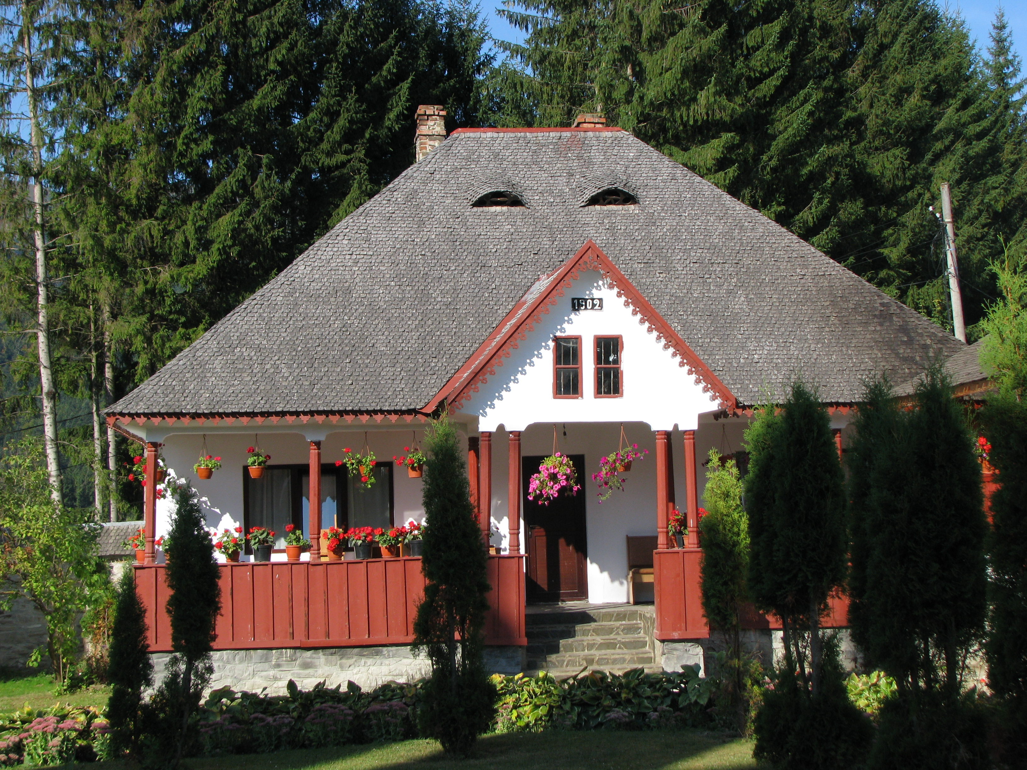 Chilie la Manastirea Cheia 03